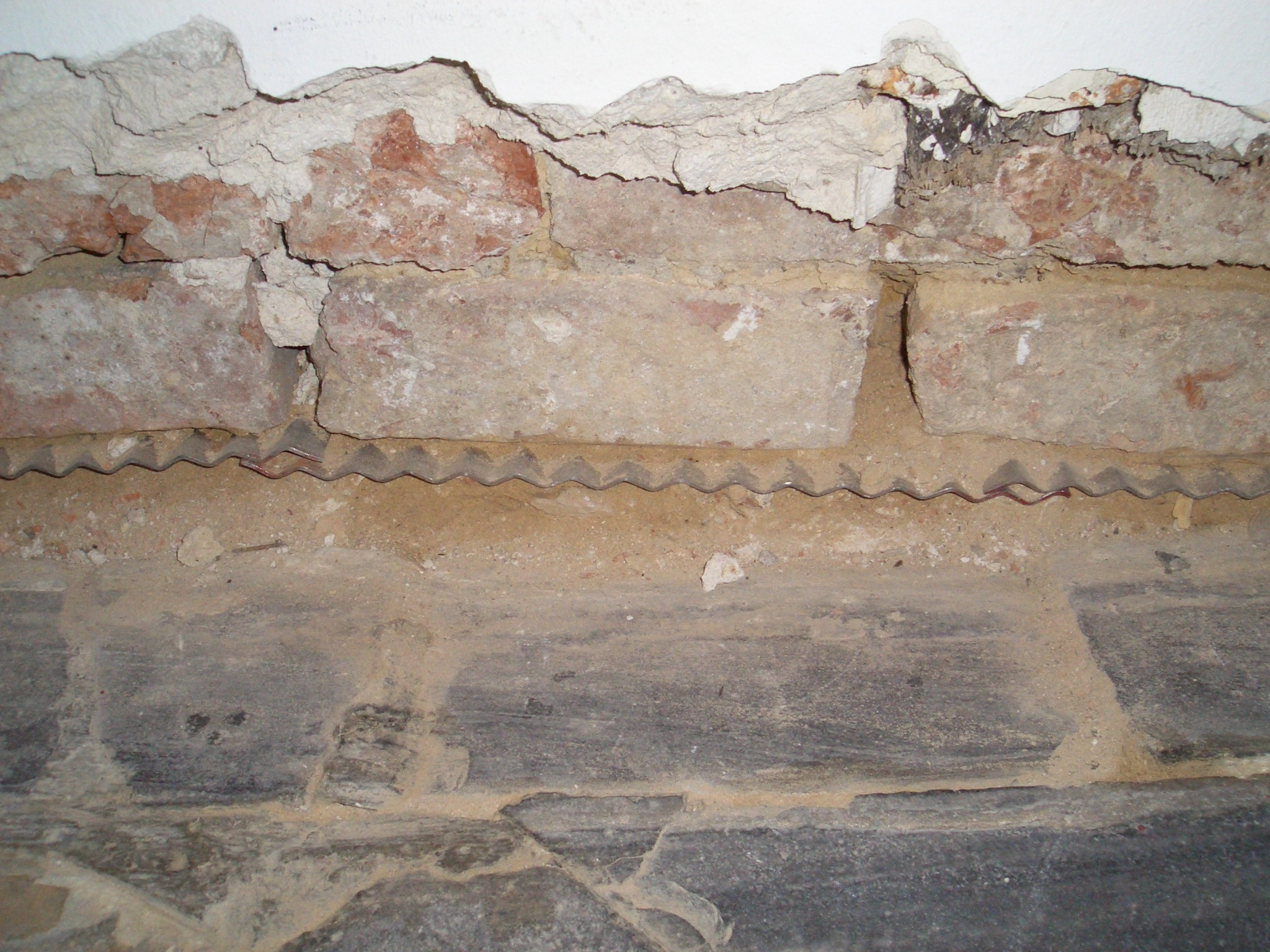 Horizontalsperre zur Mauertrockenlegung mittels eingeschlagener Chromstahlplatten